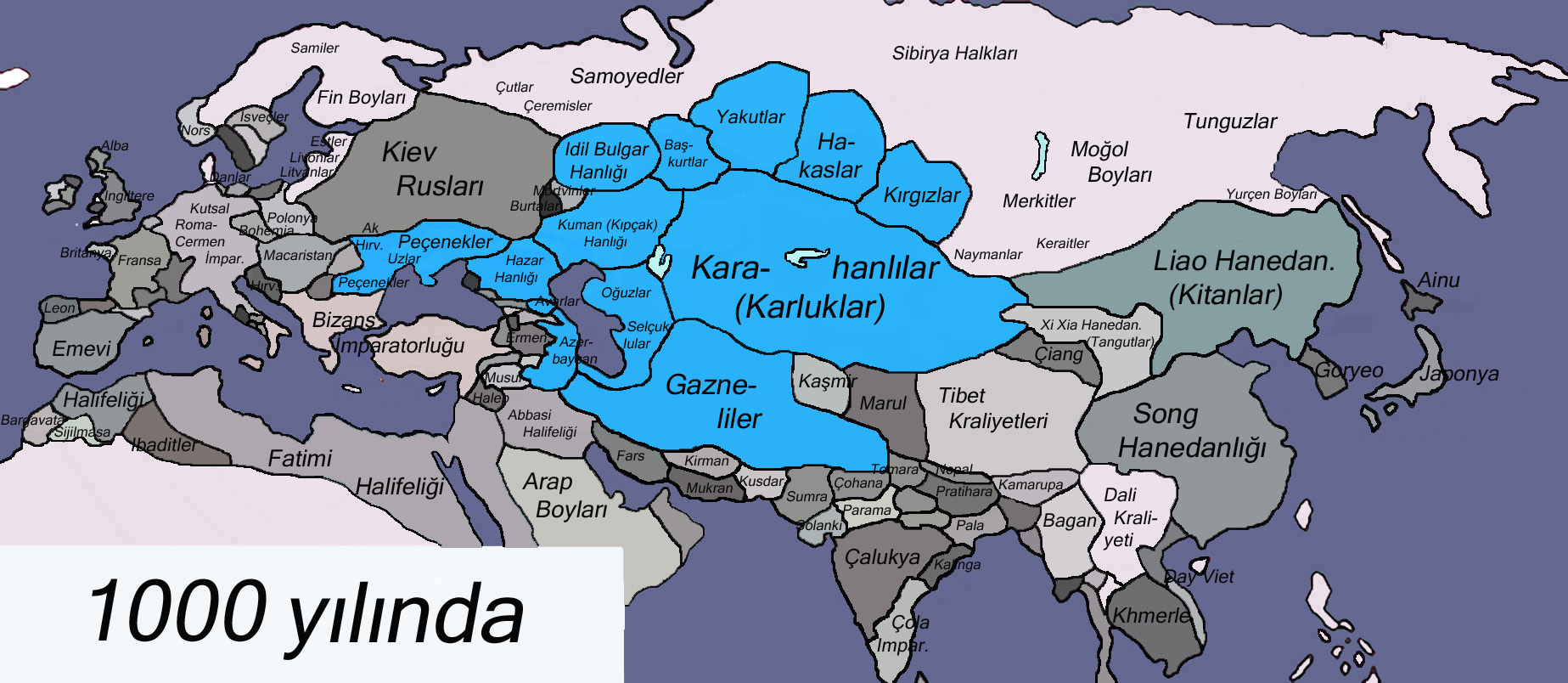 Kaynak: Haritanın büyük bir kısmı Thomas Lessmann'nin izini ile kendi ürettiği Tarihi dünya haritaları'ndan alınmıştır. Ayrıca Jean-Paul Roux'un Türklerin Tarihi (ISBN 975-997-091-0) adlı kitabındaki tariflerine göre ve Büyük Tarih Atlası (Arkın Kitabevi ISBN 975-402-012-4) ile bazı düzeltmeler ve ilaveler yapılmıştır.